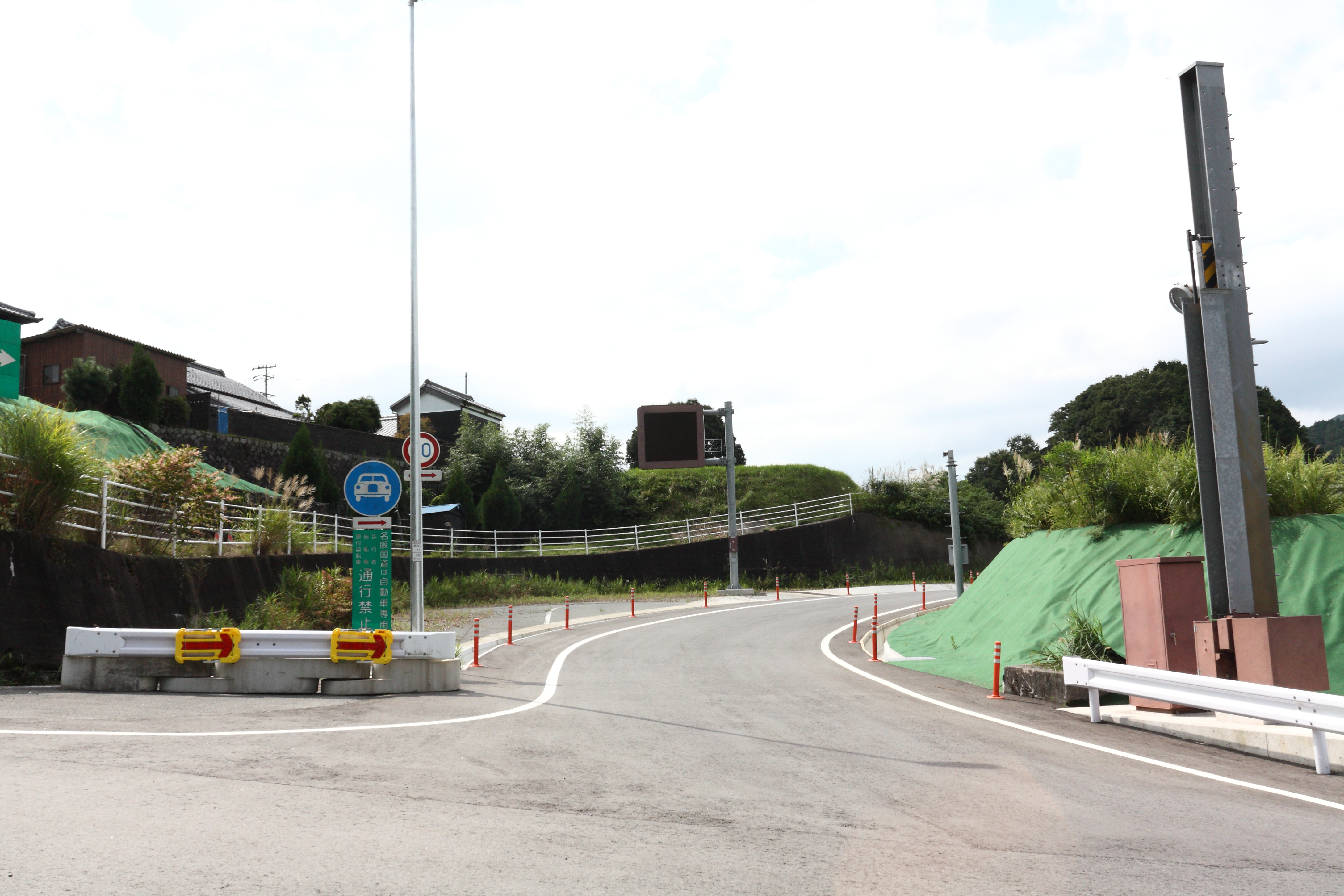 名阪国道 南在家インターチェンジ 天理方面入口 三重県亀山市加太中在家